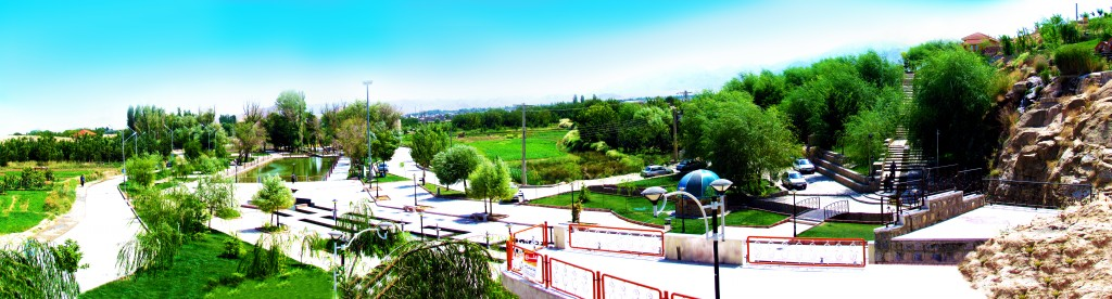 چشمه محمد رسول الله (ص) واقع در شهرستان اقلید